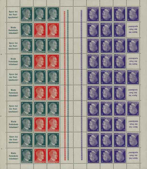 Markenheftblatt 70 für Briefmarkenheft 119 und 120